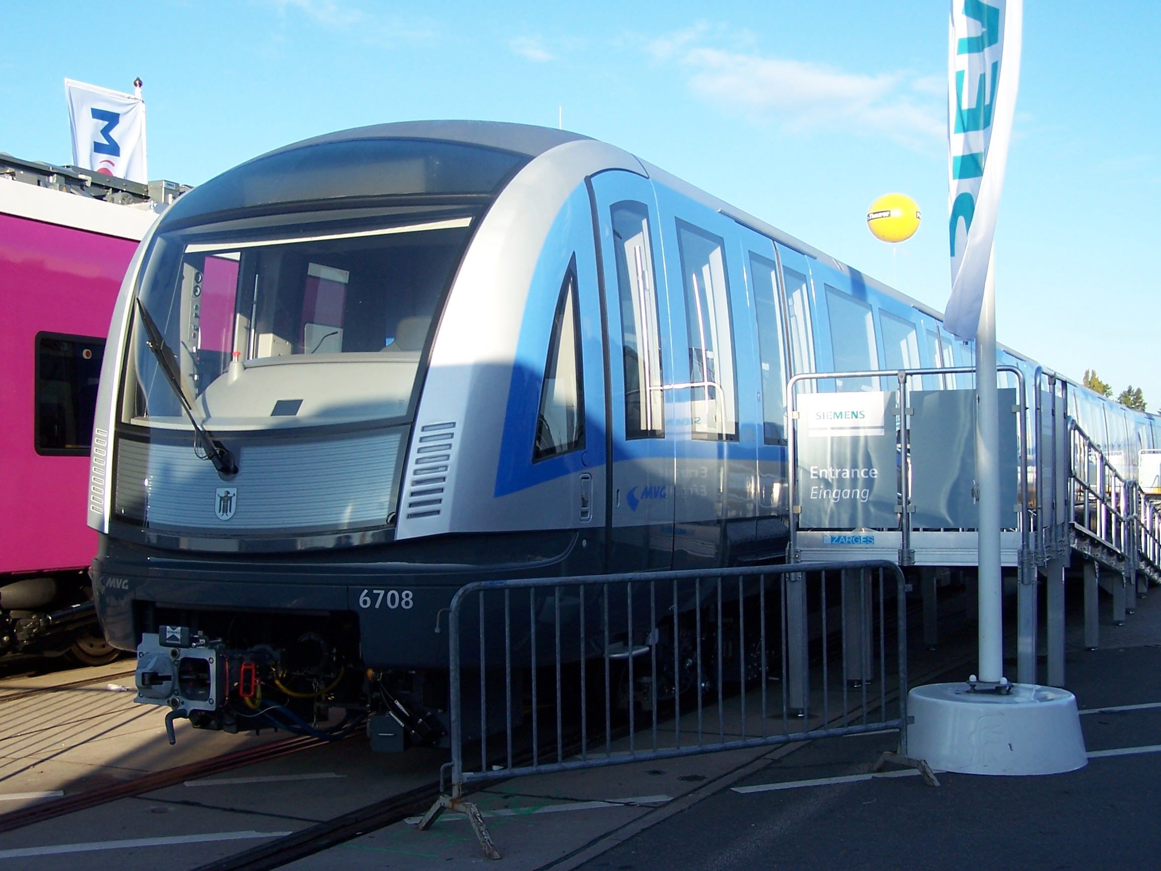 Siemens U-Bahn Zug der MVG C2 6708 auf der InnoTrans 2014.